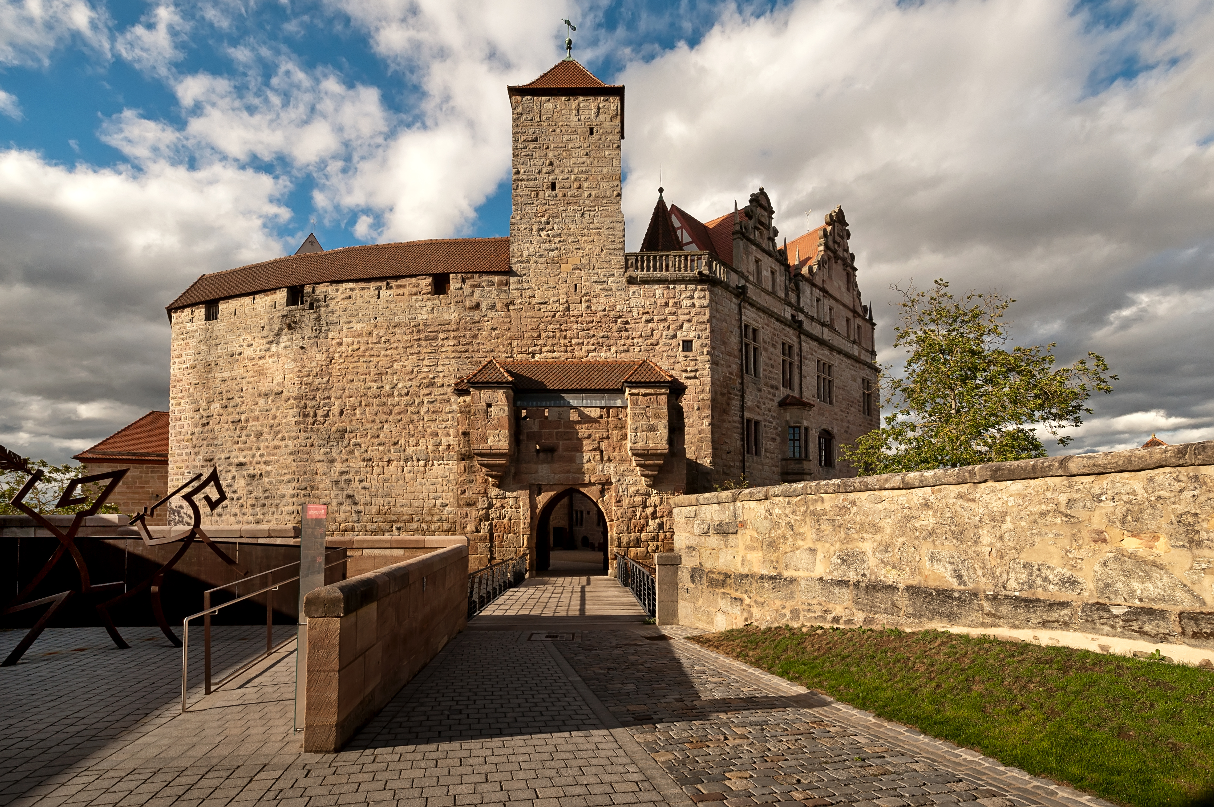 Hauptburg mit Sicht vom Schloßgarten von Hohenzollern - Langgestreckte unregelmäßige Burganlage in Spornlage mit Altem Bau, viergeschossiger Sandsteinquaderbau mit steilem Satteldach und angebautem quadratischem Folterturm, oberstes Geschoss traufseitig Fachwerk, Neuem Bau, dreigeschossiger zweiflügeliger Sandsteinquaderbau mit Satteldach, polygonalem Treppenturm mit Zeltdach und Renaissance-Sandsteingiebeln, Küchenbau, zweigeschossiger Sandsteinquaderbau mit Pultdach und großem Rauchabzug der sogenannten Ochsenbraterei, Kapellenflügel, dreigeschossiger Sandsteinquaderbau mit Satteldach und Dachreiter, Wehrgangshof mit nördlicher Ringmauer aus Sandsteinquadern und überdachtem Wehrgang, südliche Ringmauer mit überdachtem Wehrgang und Torturm gegen die Vorburg, Sandsteinquadermauerwerk, quadratischer Turm mit Zeltdach, Burganlage des 13.–15. Jahrhunderts, Neugestaltung 16. Jahrhundert, nach weitgehender Kriegszerstörung 1945 wiederaufgebautThis is a photograph of an architectural monument.